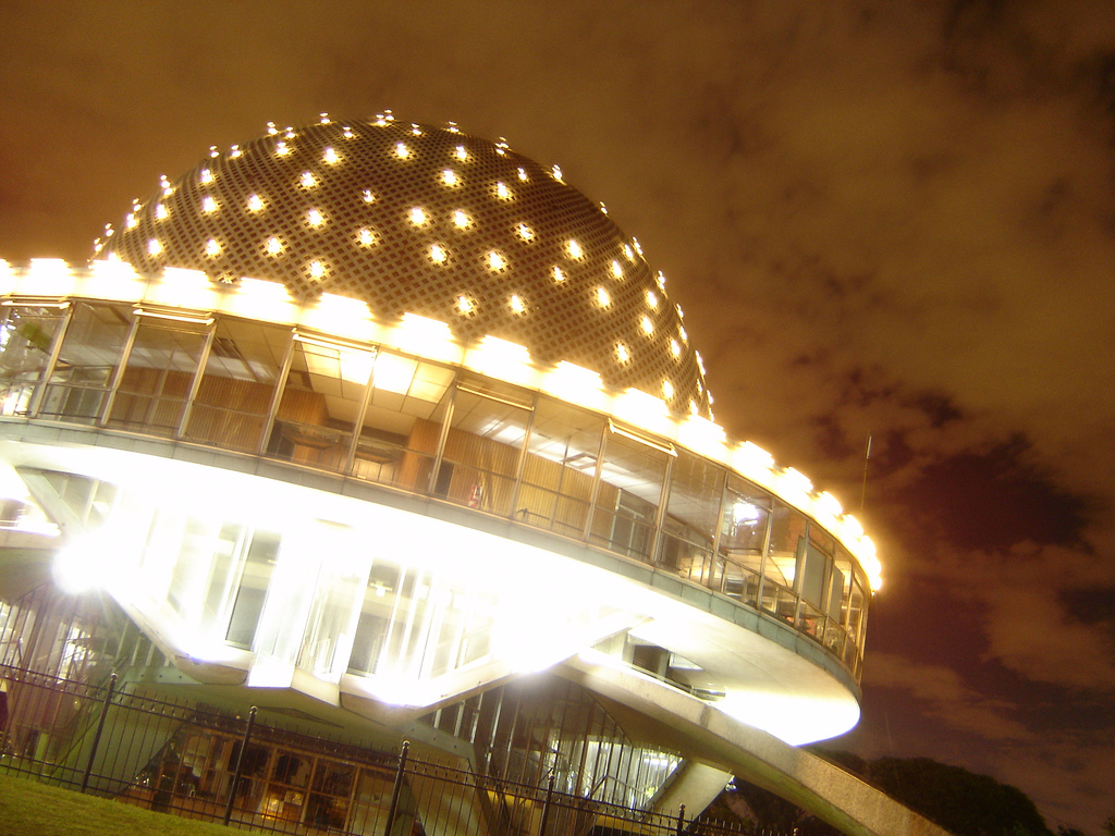 Foto del Planetario de Buenos Aires.